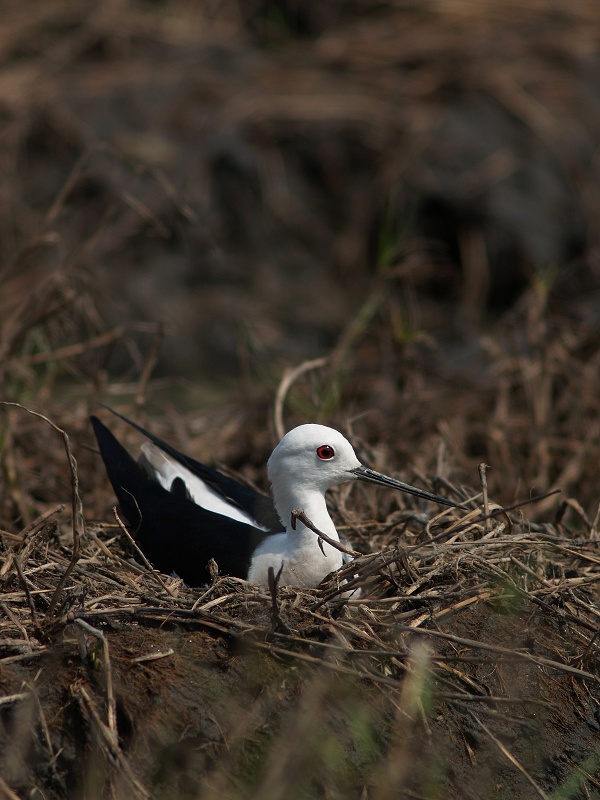 Himantopus himantopus 高蹺鴴